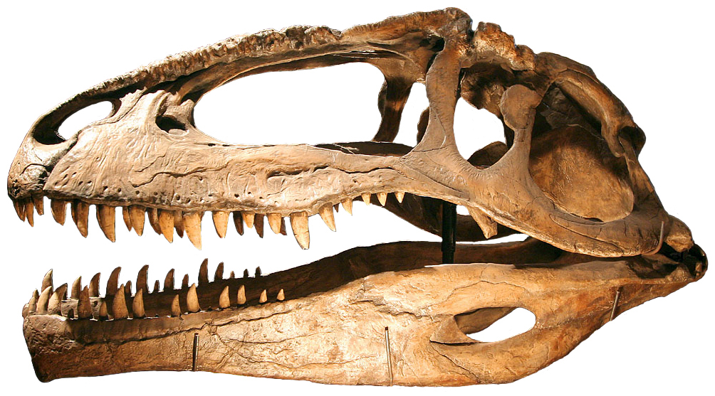 A Giganotosaurus skull cast.